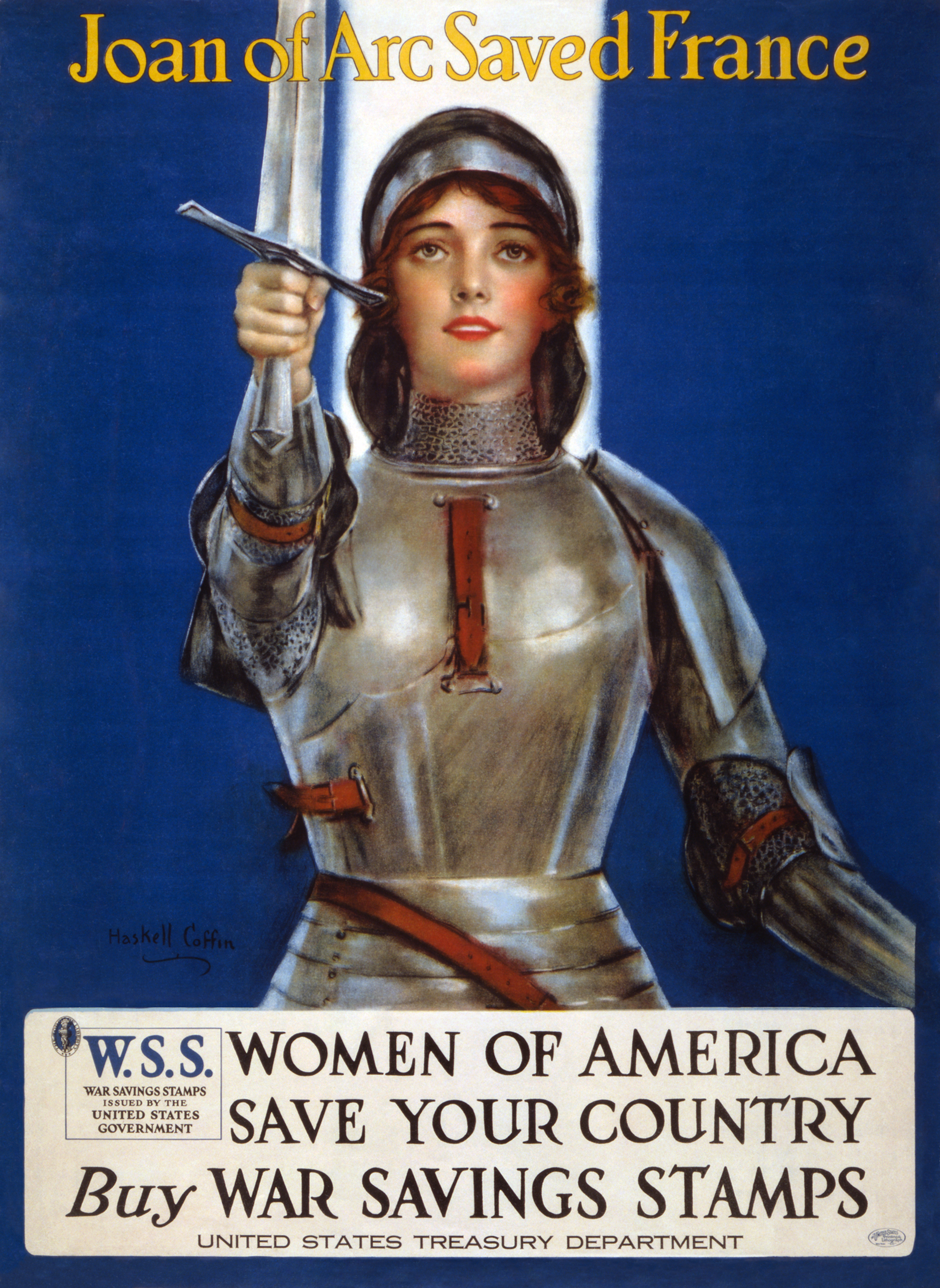 Joan of Arc saved France--Women of America, save your country--Buy War Savings Stampslabel QS:Len,"Joan of Arc saved France--Women of America, save your country--Buy War Savings Stamps" label QS:Lfr,"Jeanne d'Arc a sauvé la France. Femmes d'Amérique, sauvez votre pays en achetant des bons de guerre" label QS:Ltr,"'Jeanne d'Arc Fransa'yı kurtardı. Amerikan kadınlar ülkenizi kurtaracaktır. Savaş yardım pulu satın alın. (I. Dünya Savaşı savaş yardım pulu afişi, 1918)."